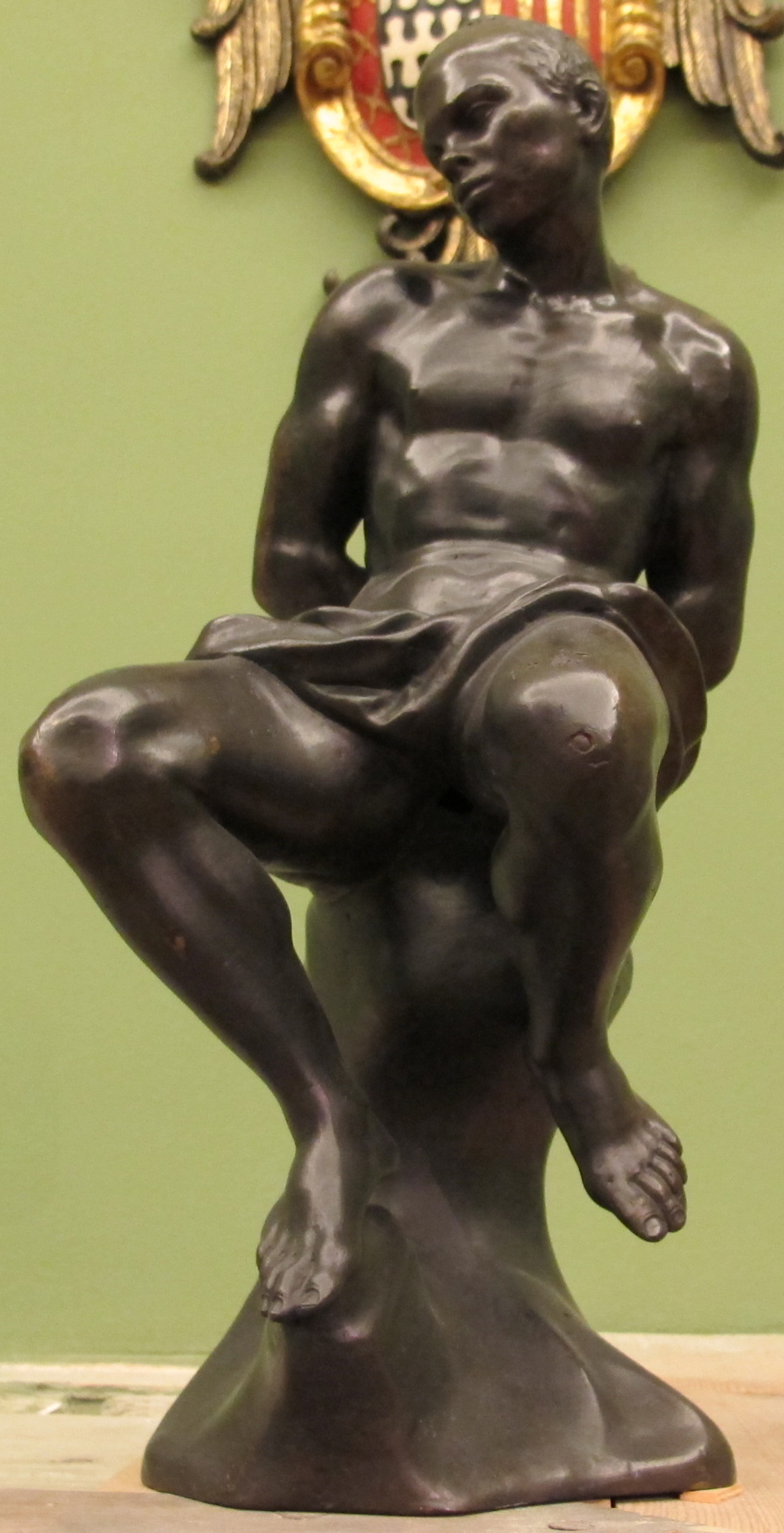 Giovan battista foggini, corsaro legato